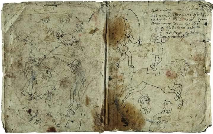 Coperțile primului caiet de desen pe care Gheorghe Tattarescu a desenat cu cerneală pe hârtie primele sale încercări de desen la vârsta de circa 7 ani - Muzeul Gheorghe Tattarescu